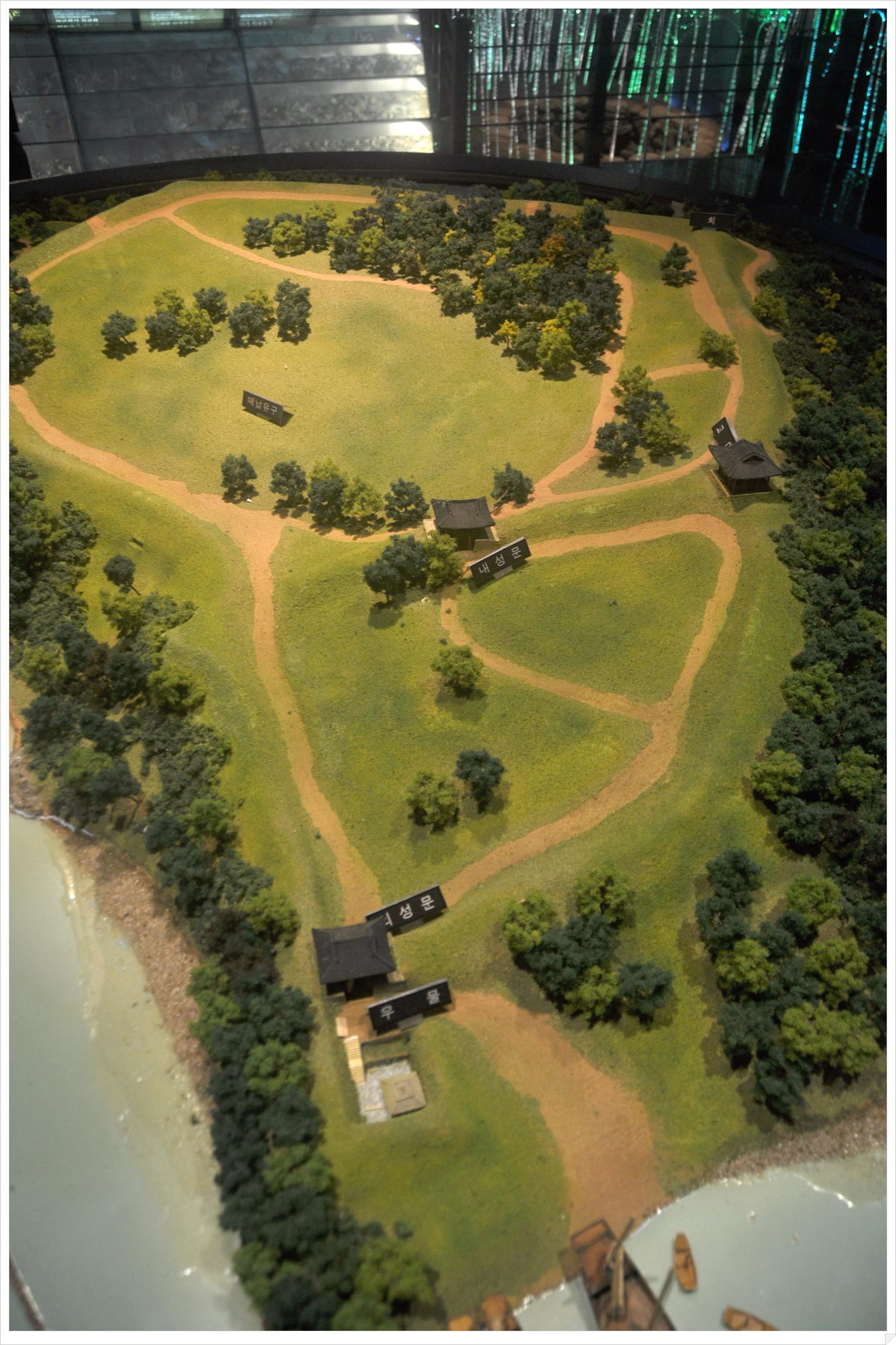 청해진 모형 (장보고 기념관 소재)